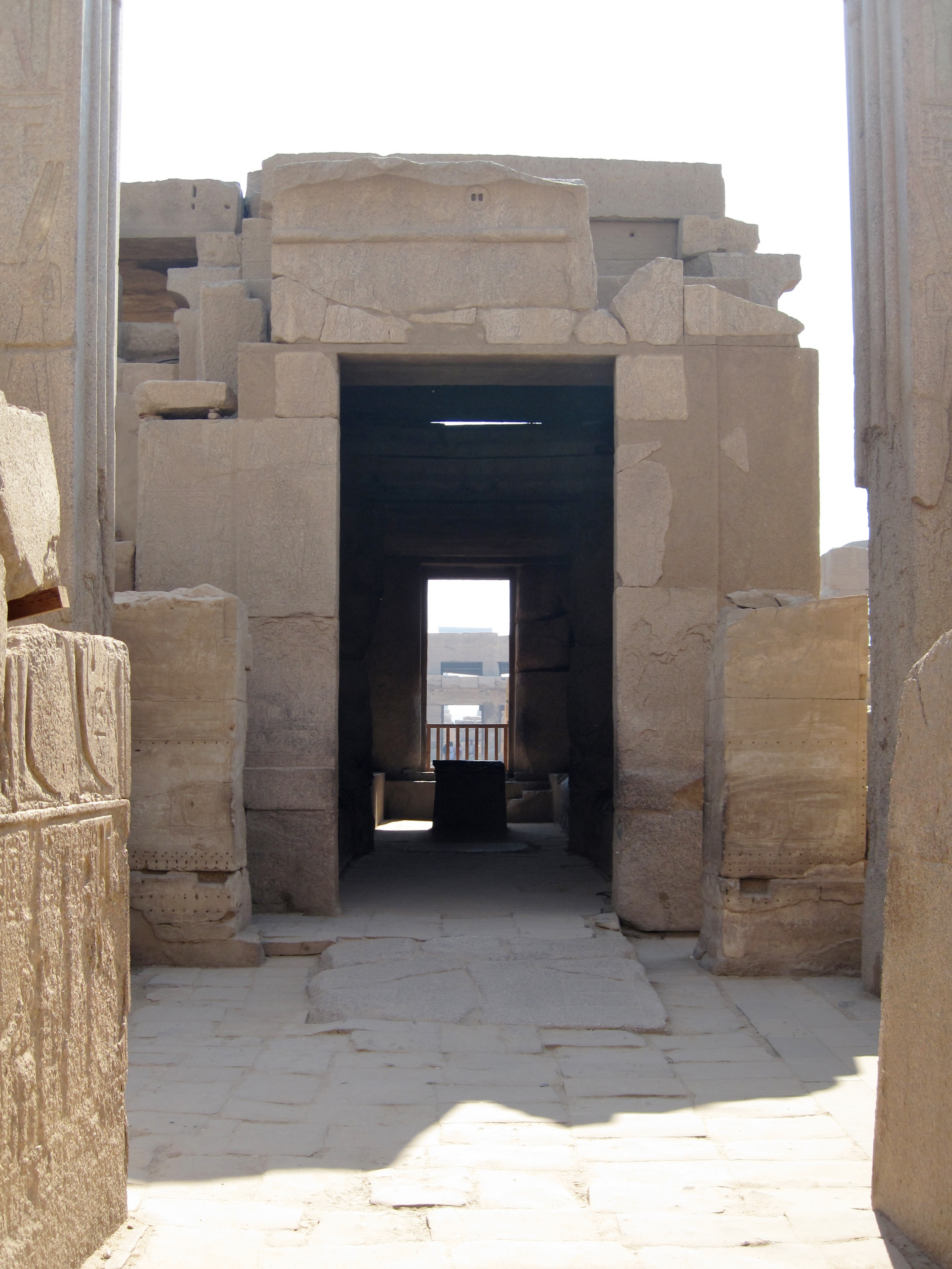 Barkenkapelle des Philipp III. Arrhidaios im Tempel von Karnak, nördlich von Luxor, Ägypten